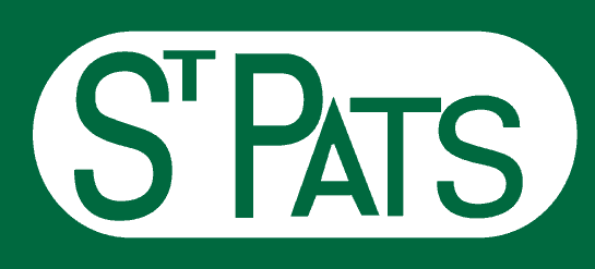 Logo des St. Patricks de Toronto de la saison 1923-24 à la saison LNH 1924-25.